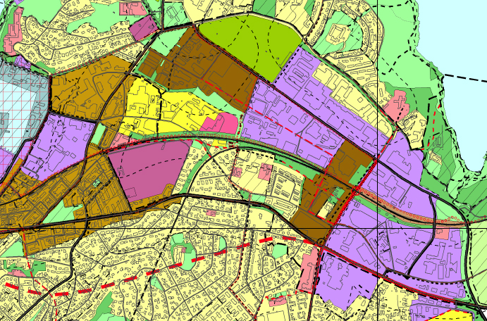 Utsnitt av Trondheim kommuneplans arealdel 2012-2024. Utsnittet viser området Lade, Leangen og Rotvoll